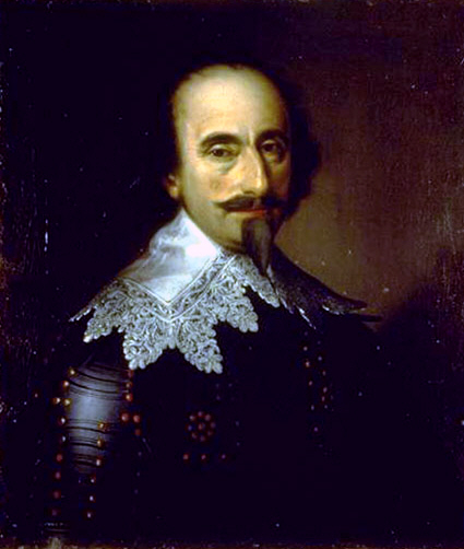 Herrenporträt Heinrich Herzog von Rohan (1579-1638). Öl auf Leinwand; Aus der Sammlung François Tronchin (1704-1798), Genf. 59 cm x 52 cm Schweizerisches Landesmuseum, Zürich